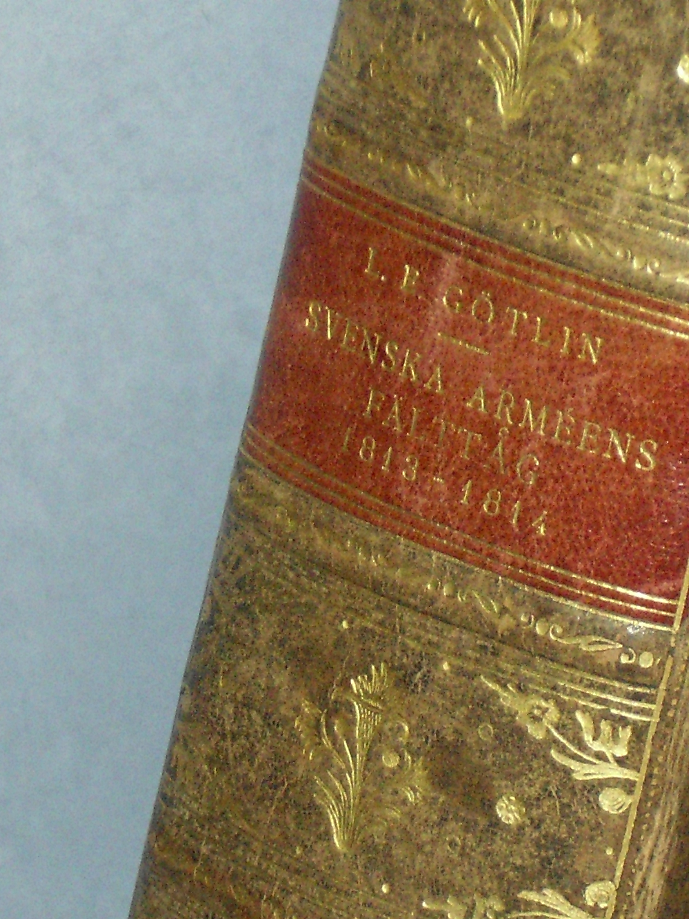 Anteckningar från Svenska Arméens Fälttåg 1813 och 1814 Krigs- och reseskildringar Anteckningar från Svenska Arméens Fälttåg 1813 och 1814 Författare: L.E. Götlin onsdag 15 juli 2009 H. K. H. Kronprinsen af Sverige. Vald till tronarvinge på riksdagen i Örebro 1810. Inledningen till de tre volymerna, Anteckningar under Svenska Arméens Fälttåg 1813 och 1814, som gavs ut i Örebro av fältpastorn och författaren Götlin, Lars Erik (eget förlag) 1816. Den tredje volymen gavs ut 1820. Böckerna är bara delvis krigsredogörelser för Sveriges sista krig, utan de är framförallt en reseskildring i krigens spår. Trots att volymerna är skrivna på tidigt 1800-tal, så är de lättlästa. Jag hoppas att det ska komma ut en nyupplaga av volymerna till 2010, med modernare svenska. Bernadotteättens och svenskarnas 200 års jubileeum av dess samverkan. De tre böckerna är utan reservationer en hyllning till J. B. J. Bernadotte, som deltog i de svenska fälttågen mot Napoleon Bonaparte. J.B.J. Bernadotte fick namnet Karl Johan, och när han tillträdde den svenska tronen som kung 1818, efter sin fosterfar Karl den 13:des bortgång, kom han att heta Karl den 14:de Johan. Om detta finns det mer att läsa i boken 1810. Lite om Örebro och Sverige och lite till 2010 som kommer att ges ut under senhösten 2009. Nedan är ett hederstal till Sveriges och Norges folk, som ju ingick en union 1814, med en gemensam konung.